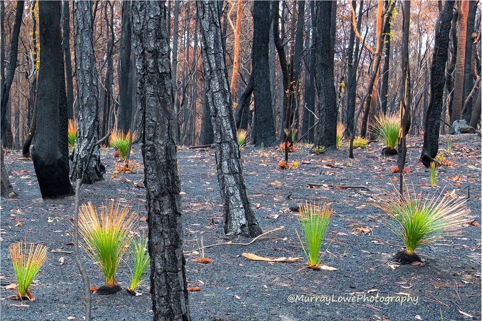 На обгорілій землі знову виростають рослини